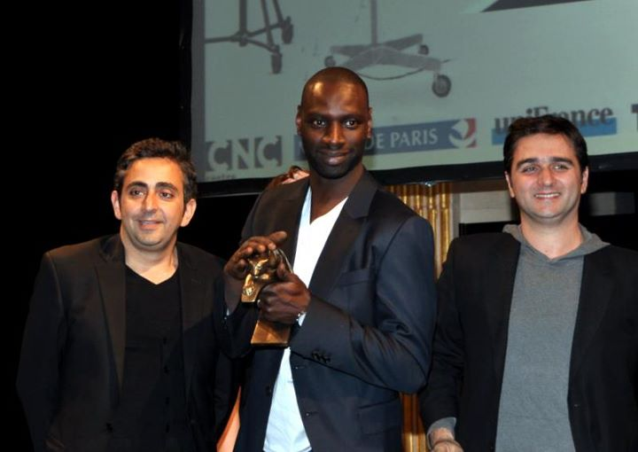 De gauche à droite : Éric Toledano, Omar Sy et Olivier Nakache à la cérémonie des Prix Lumières